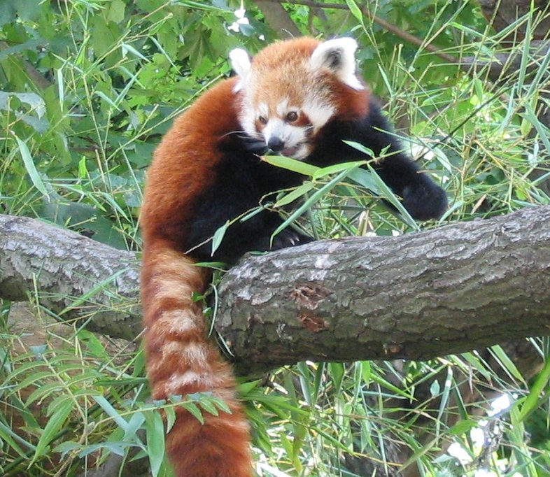 Kleiner Panda (Ailurus fulgens) im Tiergarten Schönbrunn, Wien